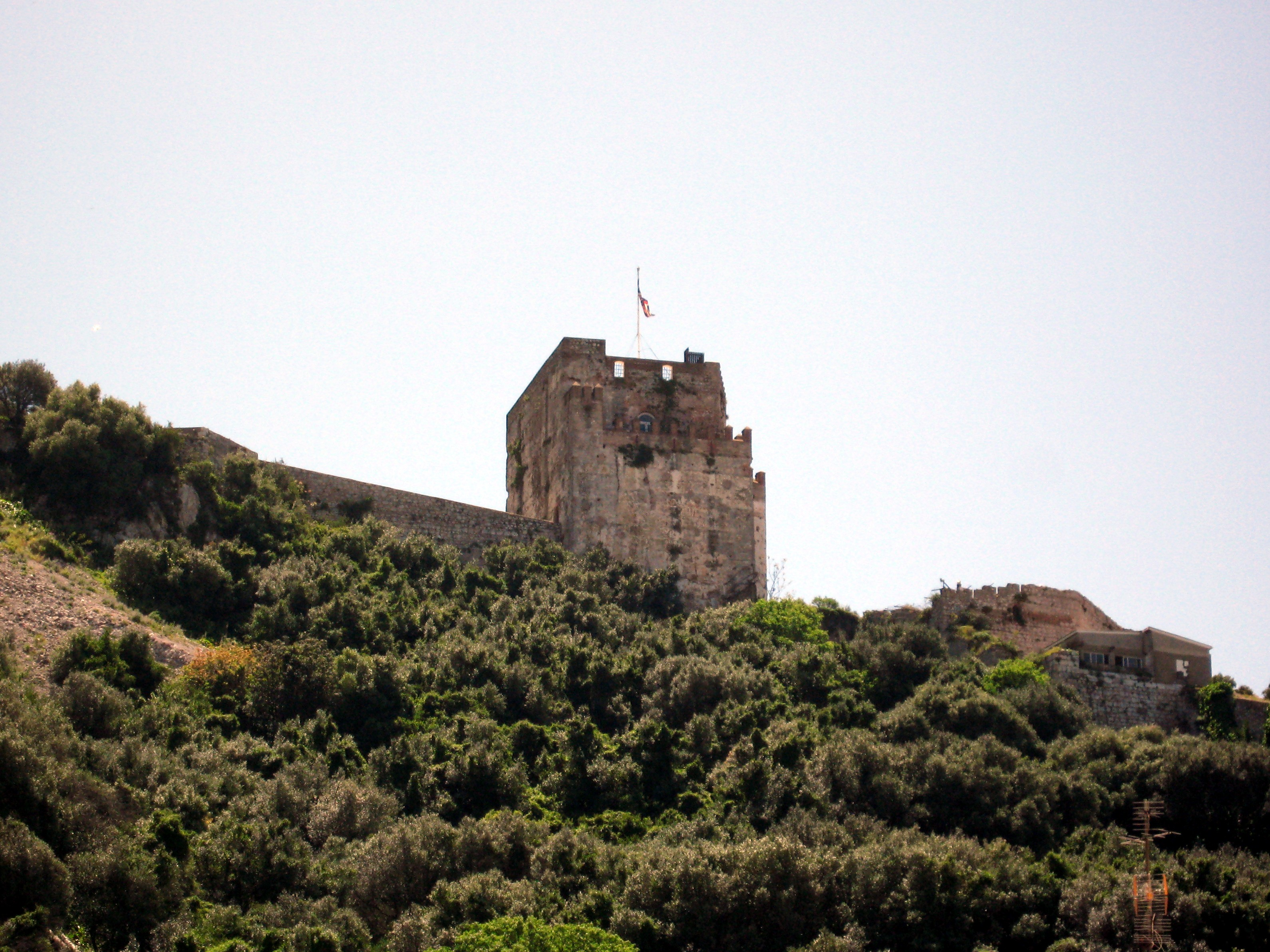 Maurenburg (Moorish Castle) in Gibraltar